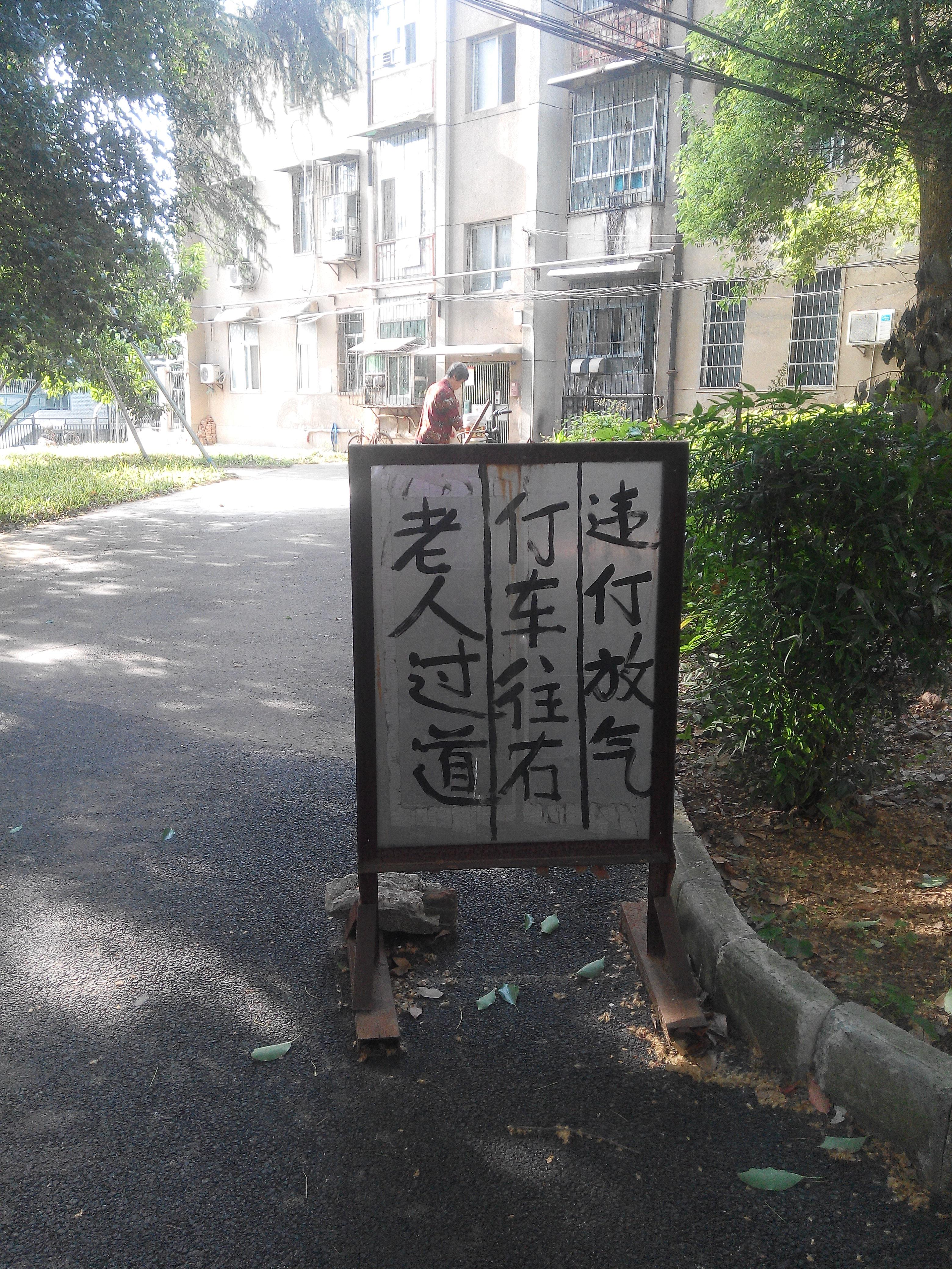 仃车往右（停車往右/停车往右）, East Campus, Wuhan University of Technology